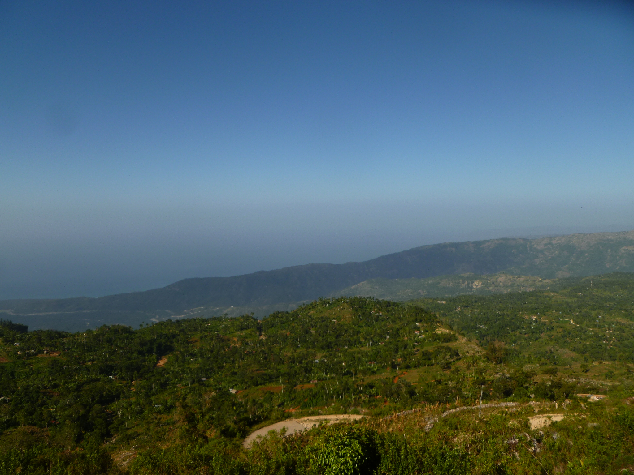 Environs de Berry, Commune de Marigot